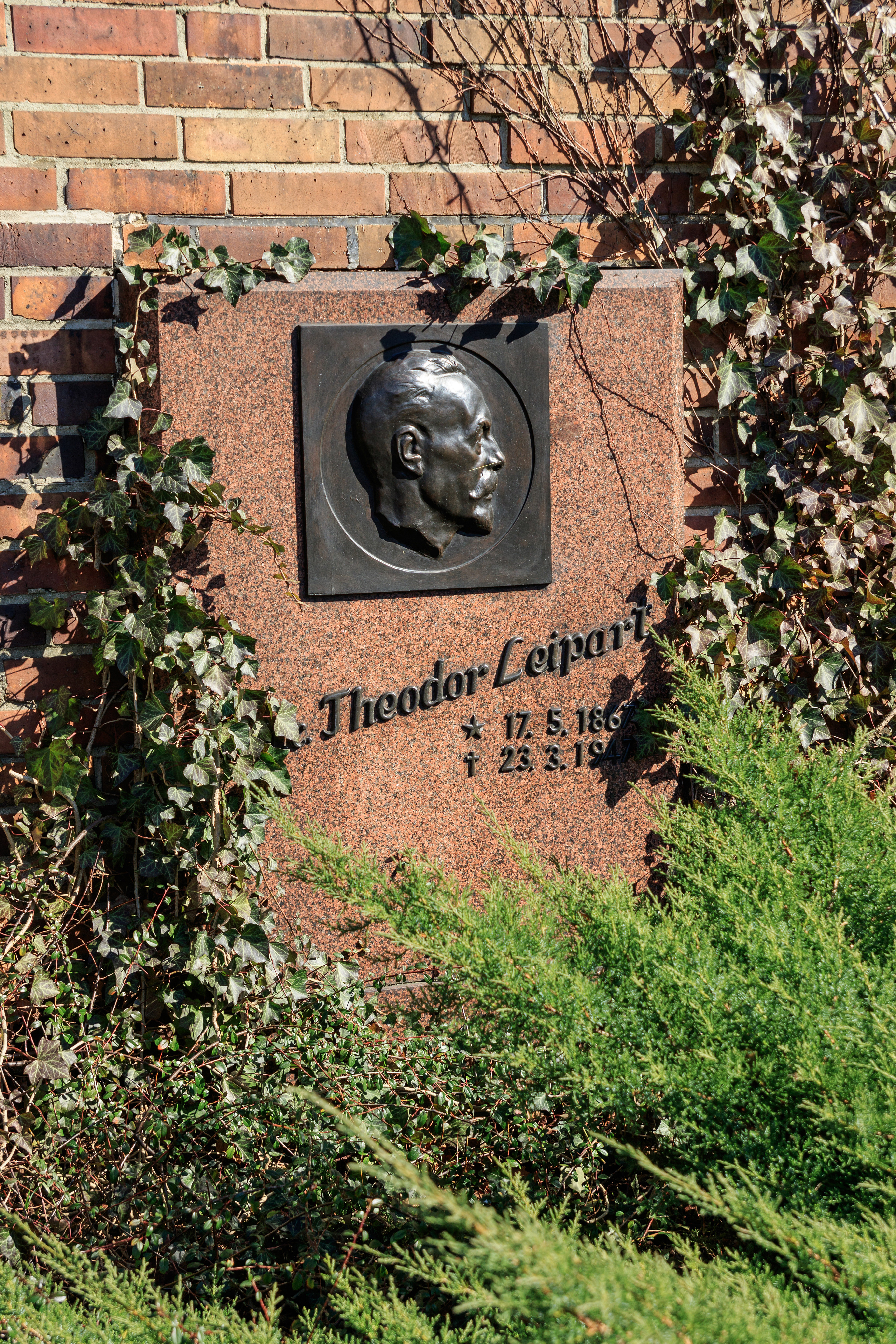 Zentralfriedhof Friedrichsfelde, Berlin-Lichtenberg. Gedenkstätte der Sozialisten, Grab von Theodor Leipart.